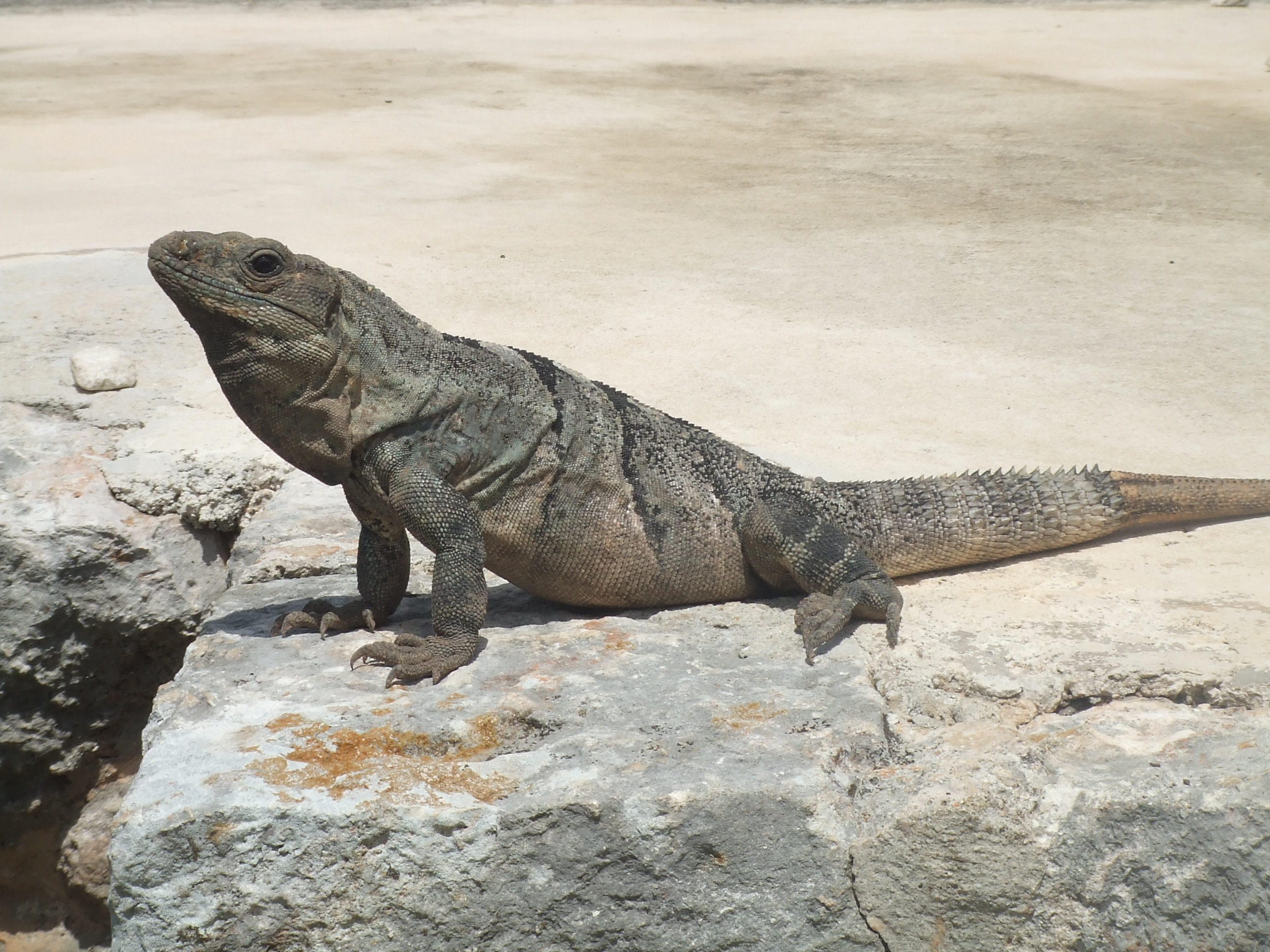 Iguane